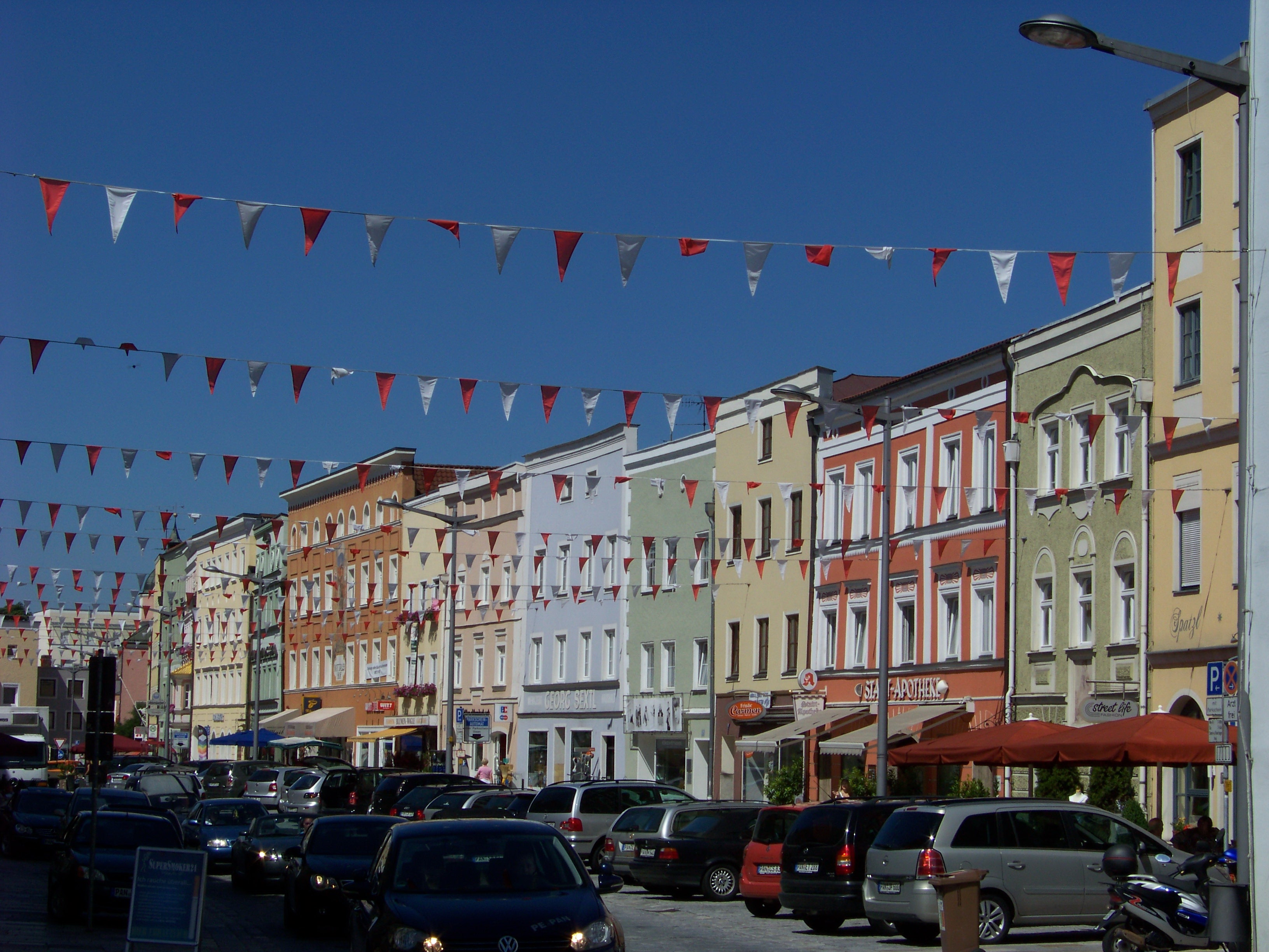 Pfarrkirchen, Altstadt. Das Ensemble umfasst den gesamten Ort innerhalb der Beringgrenze, einschließlich der fast im Quadrat herumgeführten ehem. Befestigungsanlagen von Mauer, Graben und Wall.